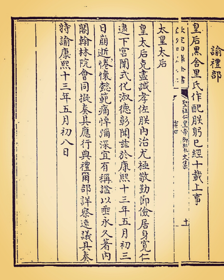 中文（台灣）: 《聖祖仁皇帝御製文集 卷四》 仁孝皇后祭文（圖片經過個人作變色處理）